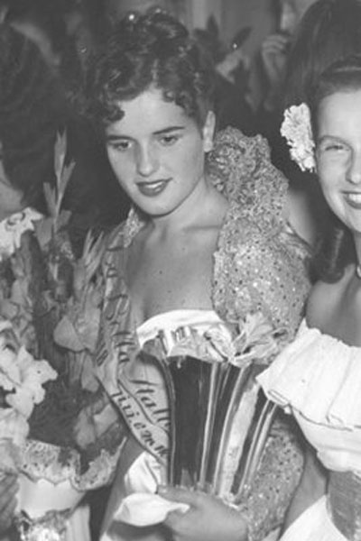 Fulvia Franco (Trieste, 21 maggio 1931 – Roma, 15 maggio 1988) Miss Italia 1948